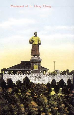 天津李公祠内的李鸿章铜像